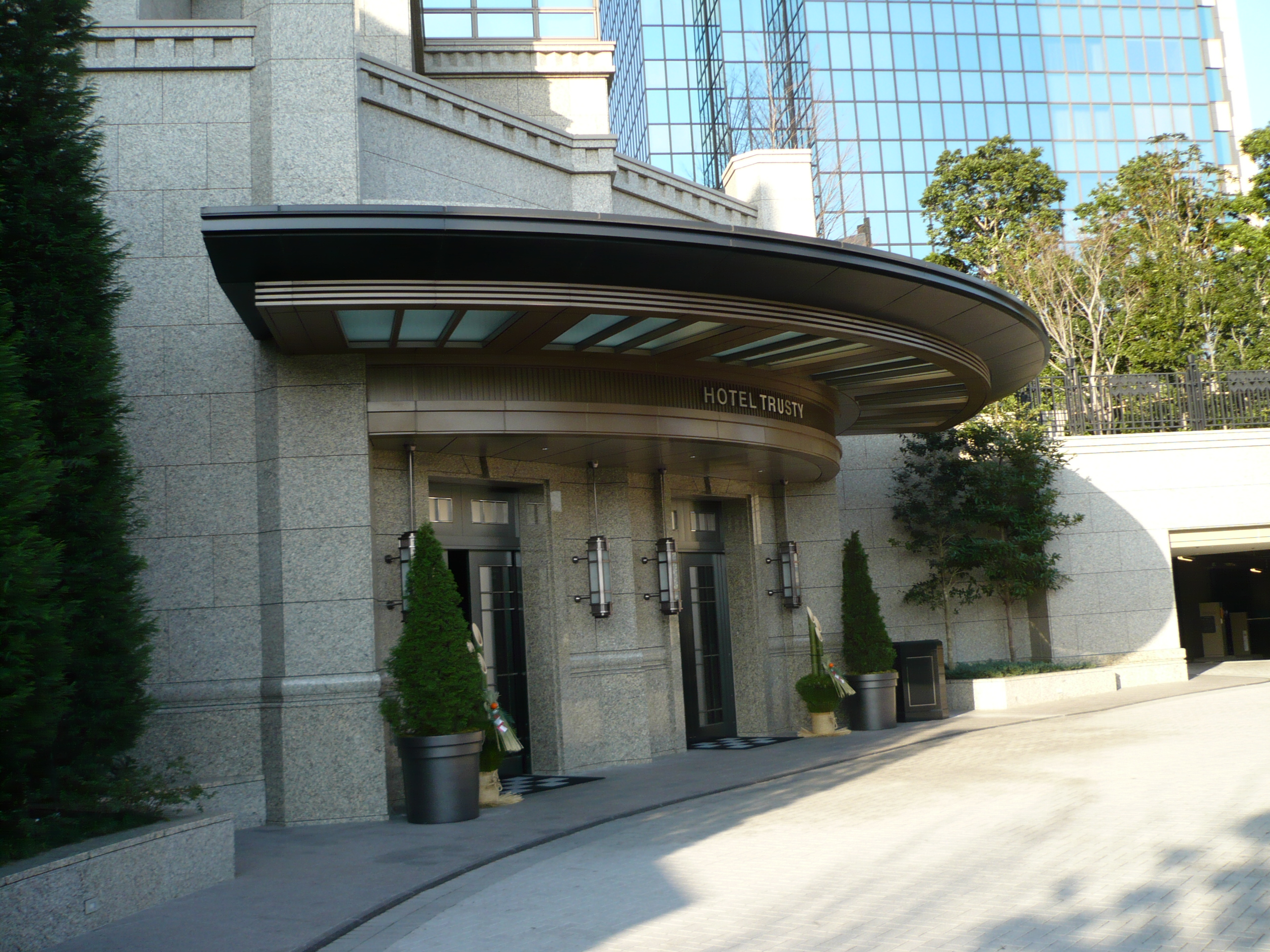 「ホテルトラスティ東京ベイサイド」正面入口